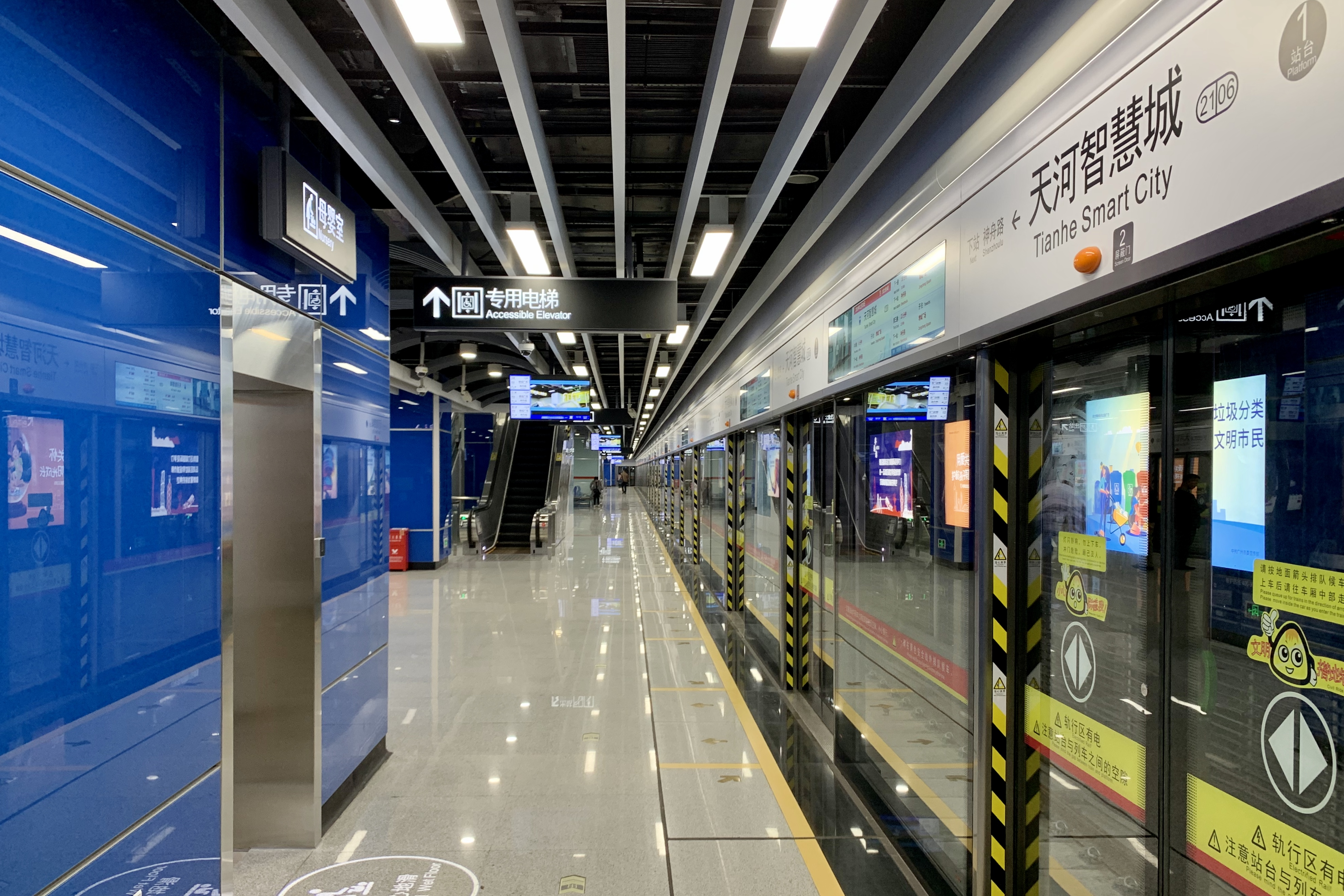 广州地铁天河智慧城站1号站台